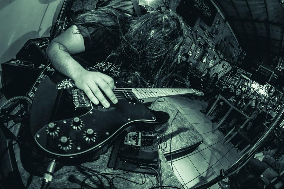 Musica en vivo en el restobar Zalsipuedes